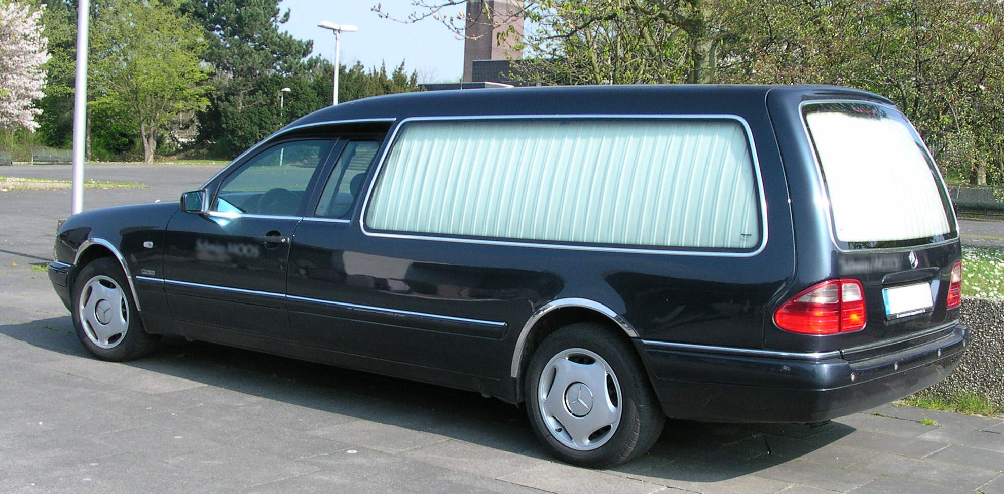 Leichenwagen von Rappold auf langem Mercedes-Benz-W210-Chassis